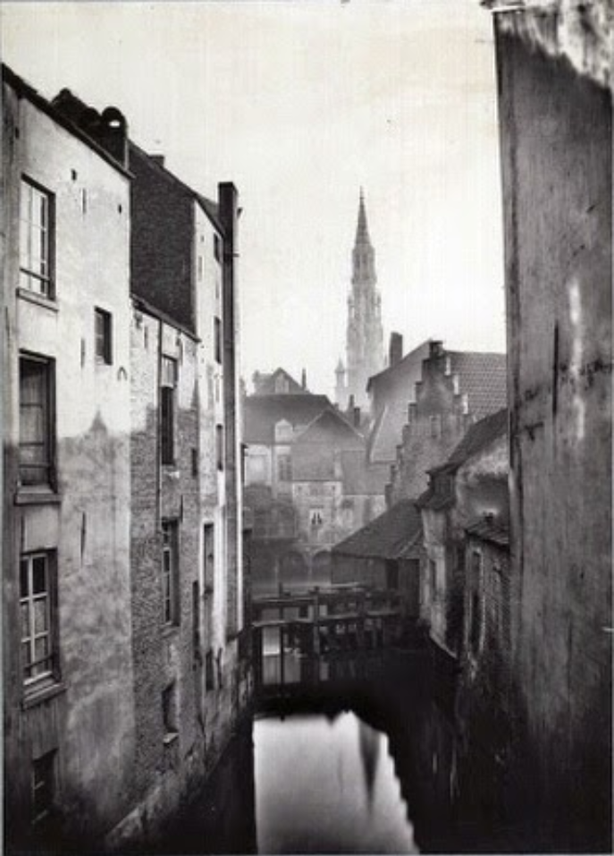 Assainissement de la Senne. Bruxelles en 1867. Vues photographiques prises à l’emplacement du nouveau boulevard à ouvrir au travers de la Ville de Bruxelles par Ghémar Frères, pour la Belgian Public Works Company Limited